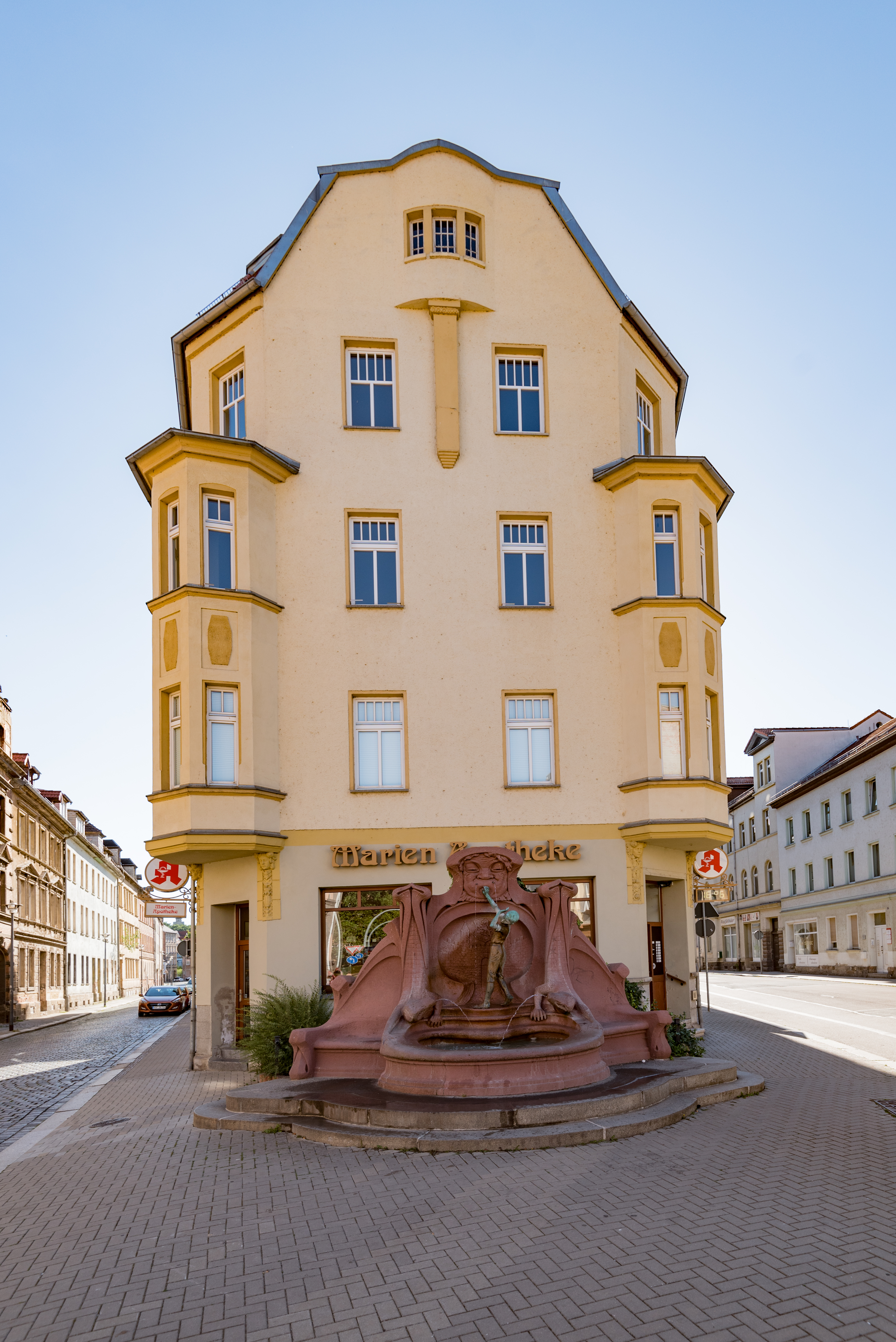 Weißenfels, Beuditzstraße 2